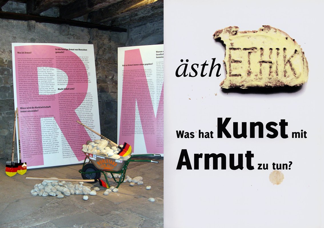 aesthETHIK Projekt/gesellschaftskritik, Foto Wolfram Höhne/Andreas Paeslack